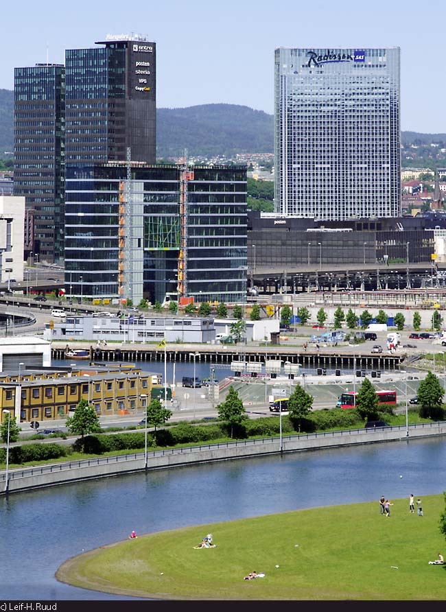 Oslo skyline (with Hotel Plaza, Postgirobygget and the Bjørvika-area) seen from the hillside of Ekeberg